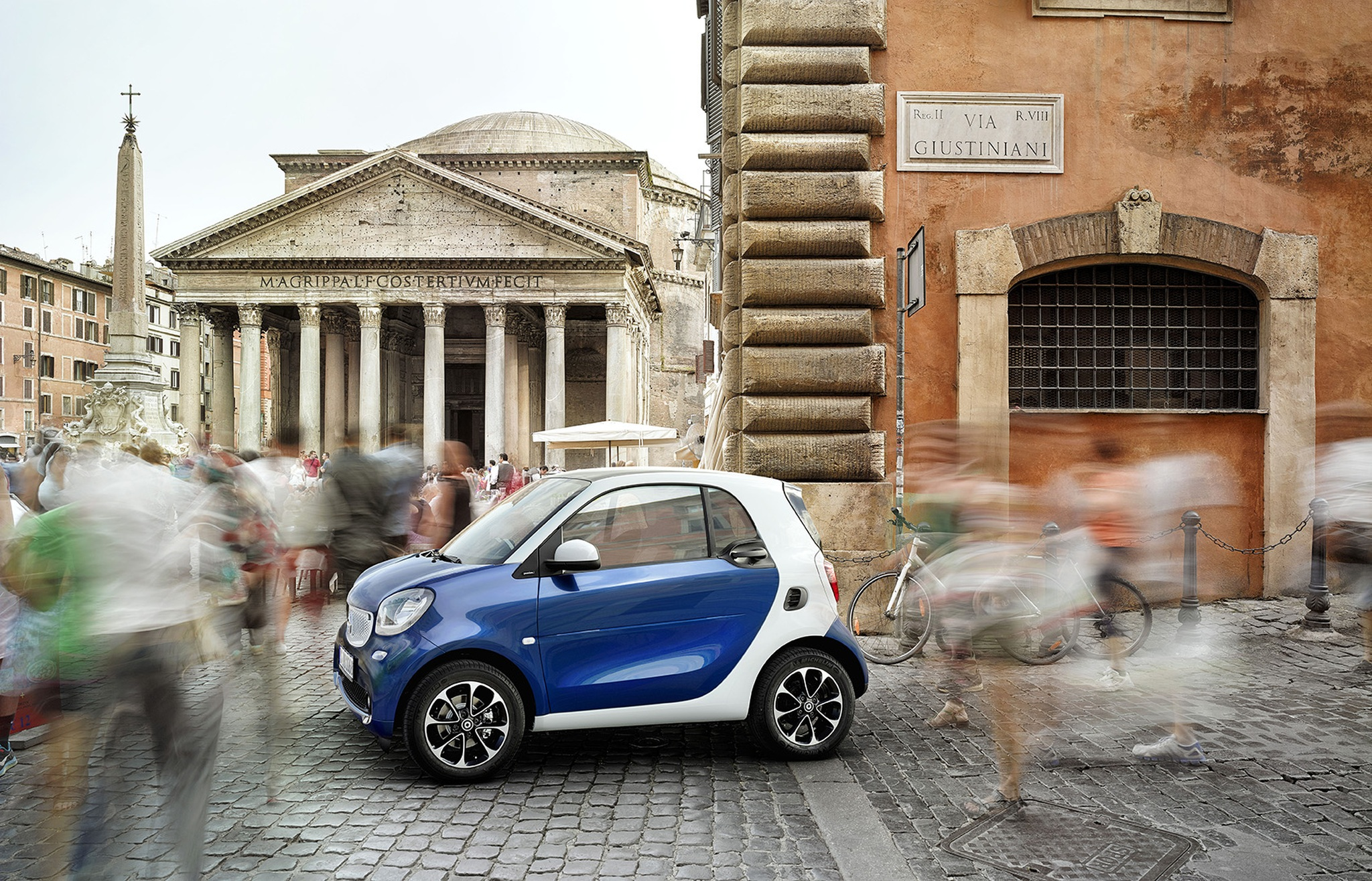 Pressefotos von Smart